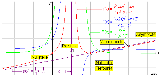 File:Einekurvendiskussion2.PNG mit weißem Hintergrund